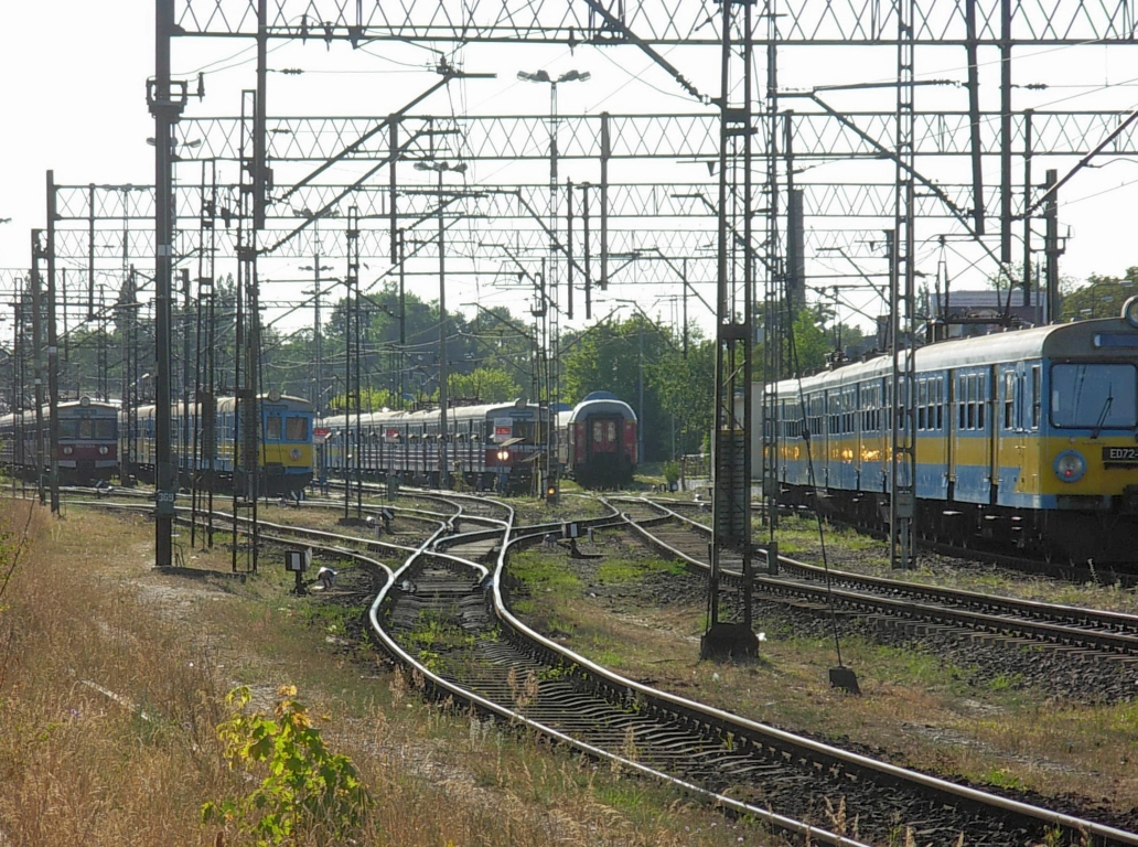 Kolejowa bocznica techniczno-kolejowa przy ul. Kamiennej w Bydgoszczy